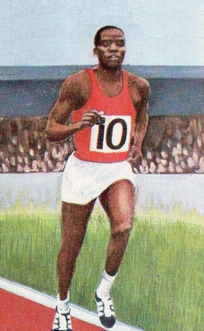 CAMPIONI dello SPORT 1969/70-n.24- KIPRUGUT - KENYA -ATLETICA